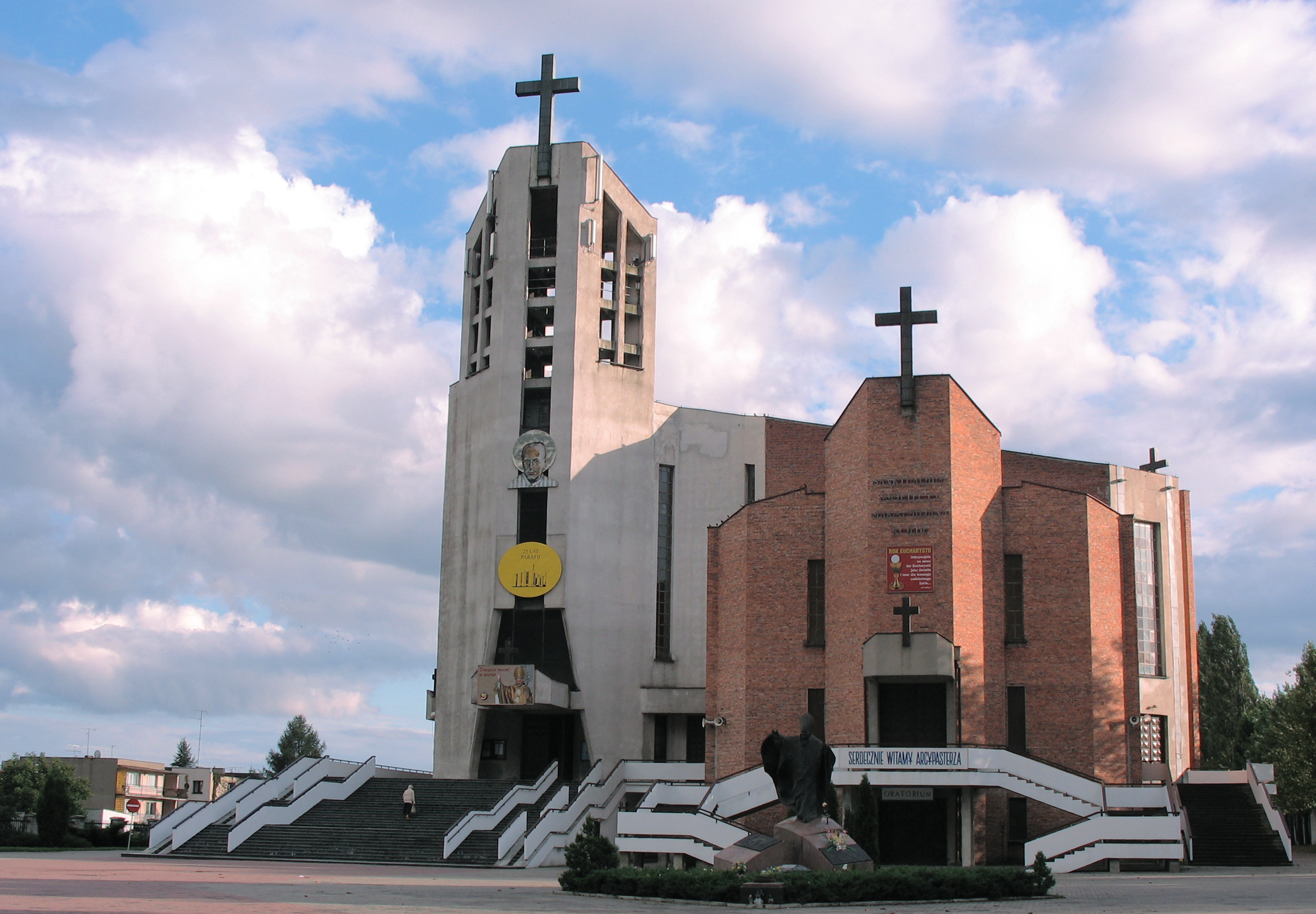 Kościół pod wezwaniem św. Maksymiliana Marii Kolbego